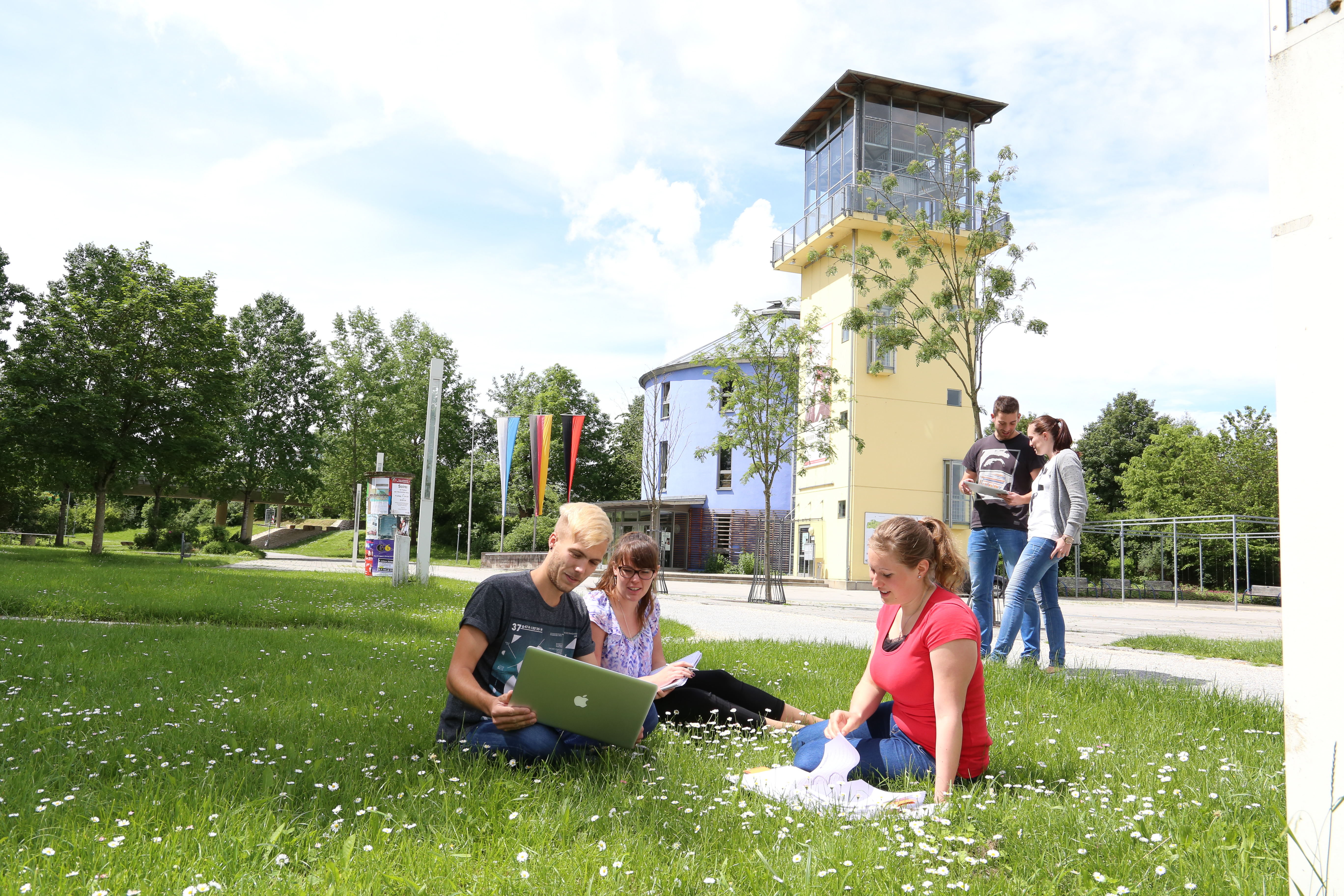 Campus Neumarkt